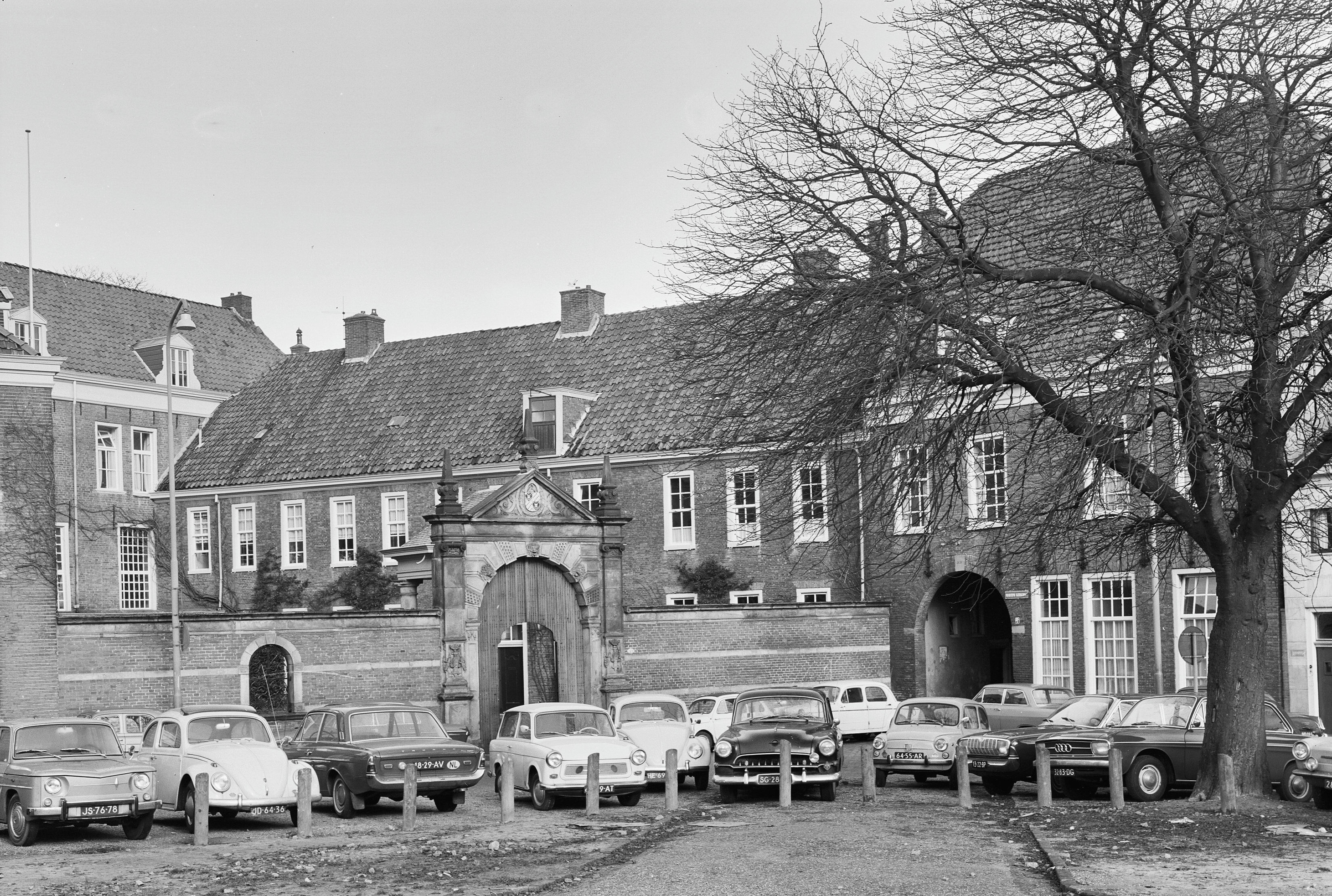 Prinsenhof: overzicht